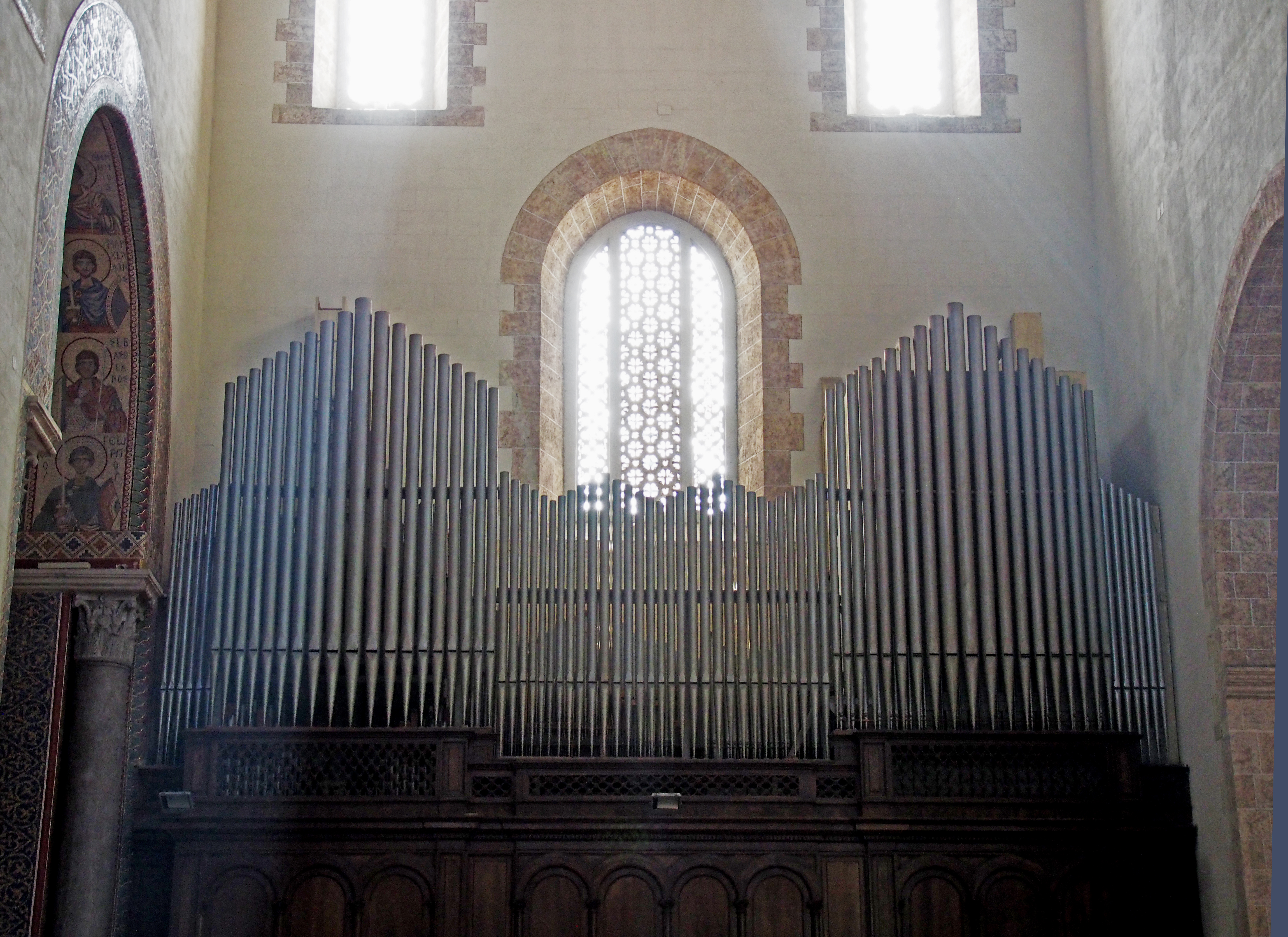 Orgel der Kathedrale von Messina